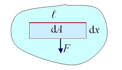 Felületi feszültség, új felület létrehozásának értelmezése